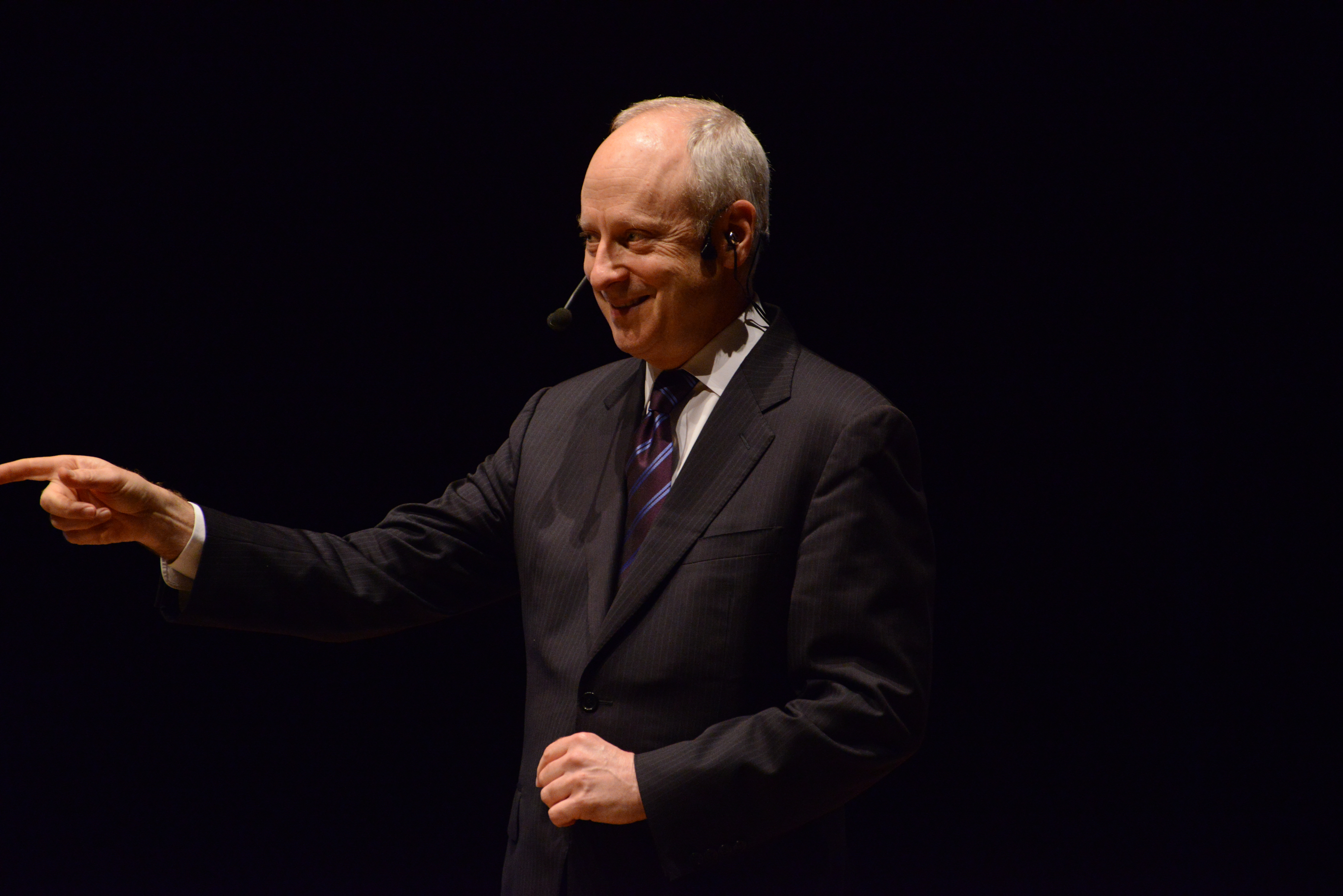 Michael Sandel no Fronteiras do Pensamento Porto Alegre 2014 Convidado: Michael Sandel, filósofo político norte-americano Data: 26 de maio de 2014 Local: Salão de Atos da UFRGS - Porto Alegre Crédito: Luiz Munhoz